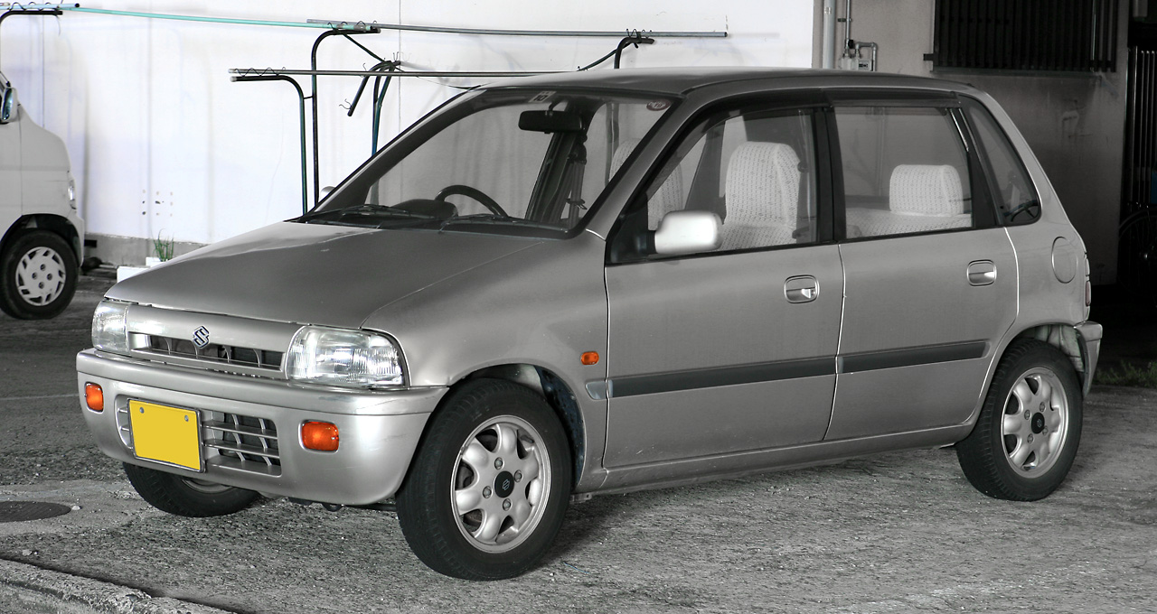 Suzuki Cervo Mode